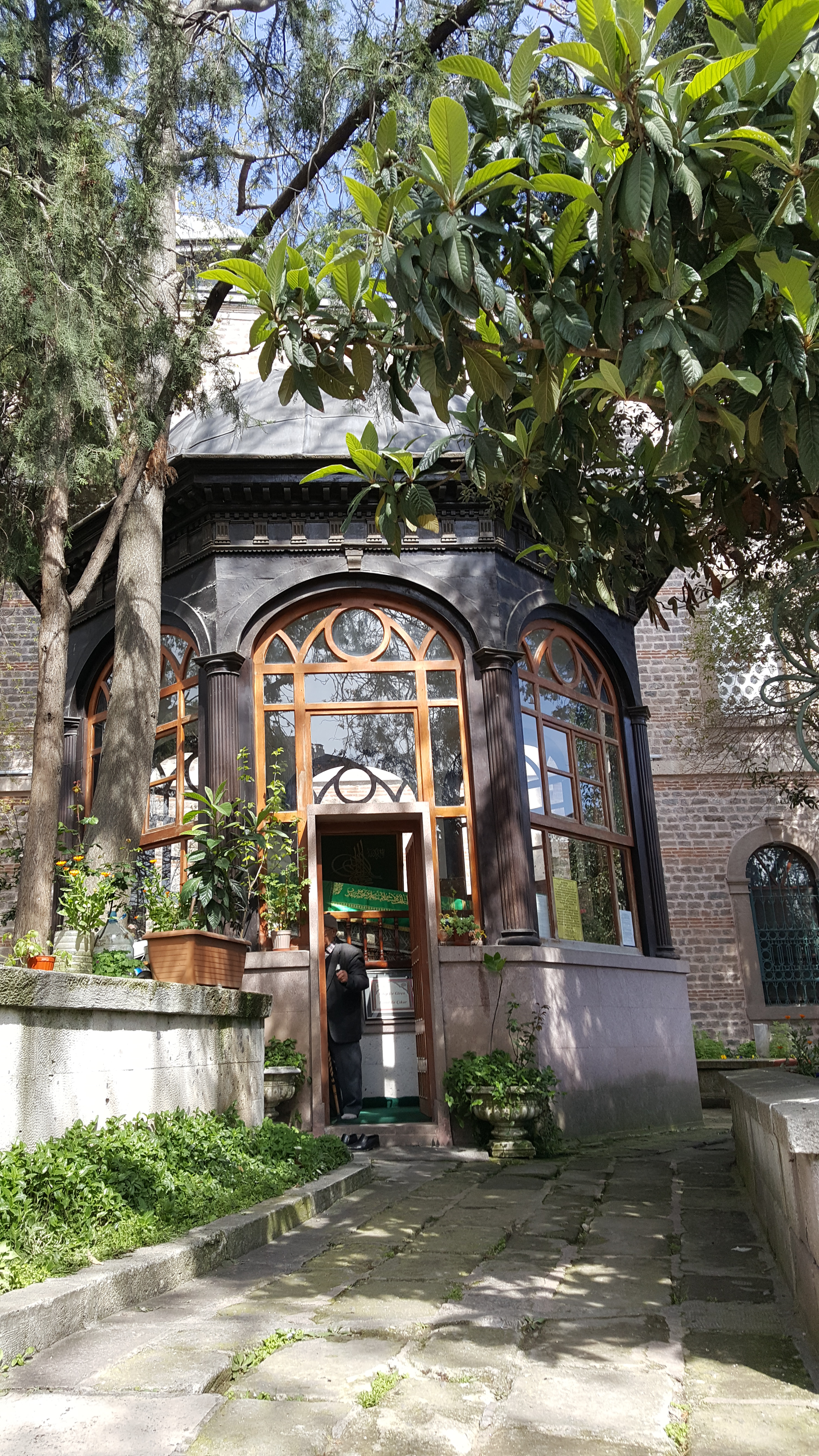 Zağanos Paşa türbesi, Balıkesir